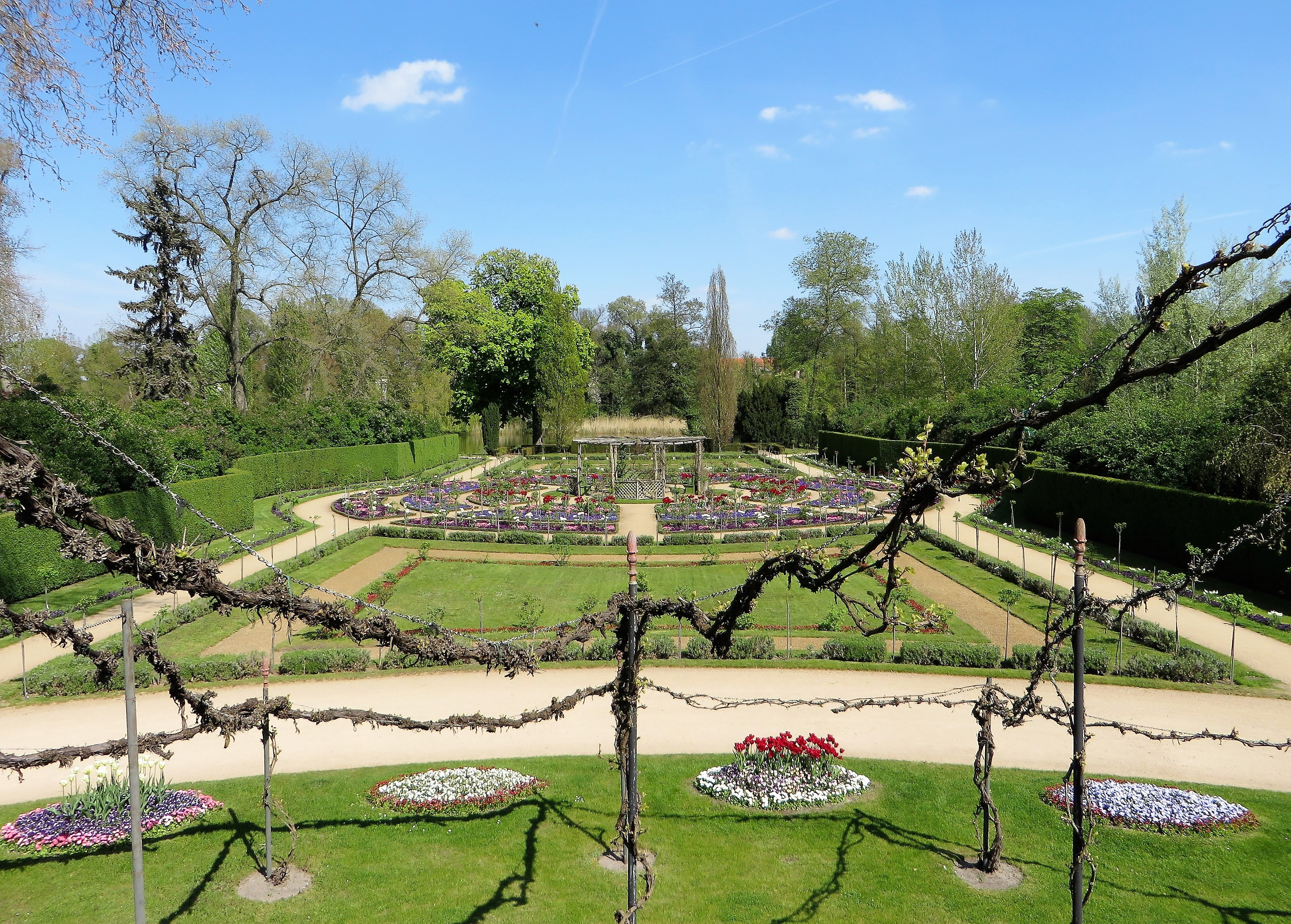 Schloss Charlottenhof (Sanssouci) in Potsdam. Blick von der Schlossterrasse auf den Rosengarten.